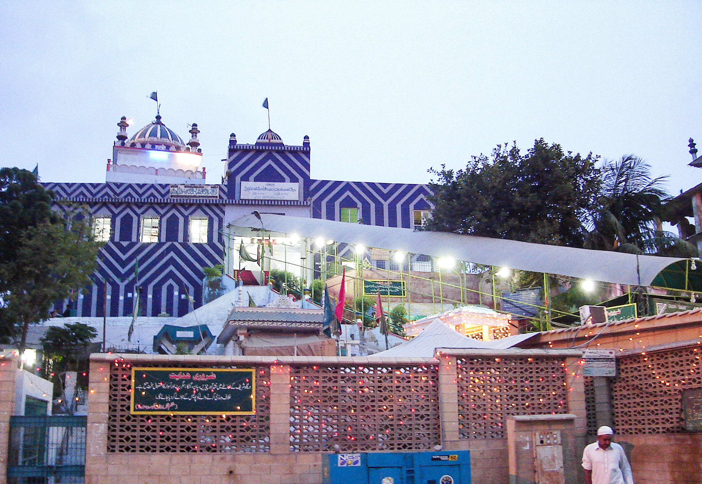 Abdullah shah ghazi mazar